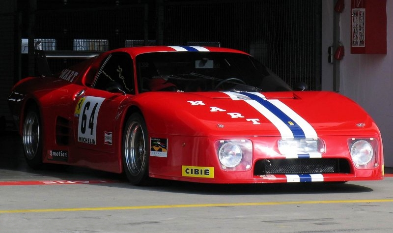 Ferrari 512 BB LeMans. Dieses Auto ist hauptsächlich für die Rennstrecke gebaut worden und läuft weit über 300 k/mh.